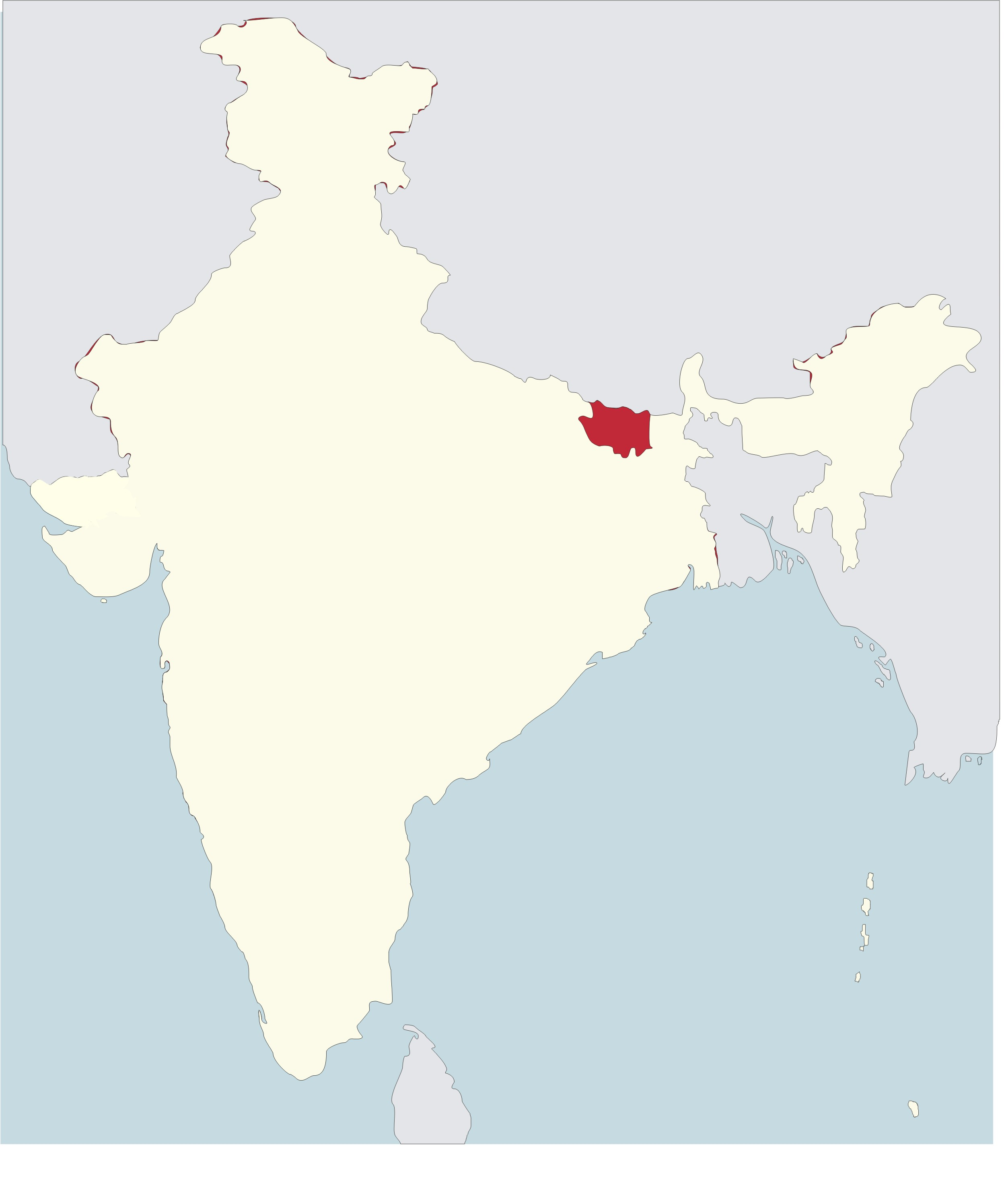 Mapa del bisbat de Muzaffarpur a l'Índia